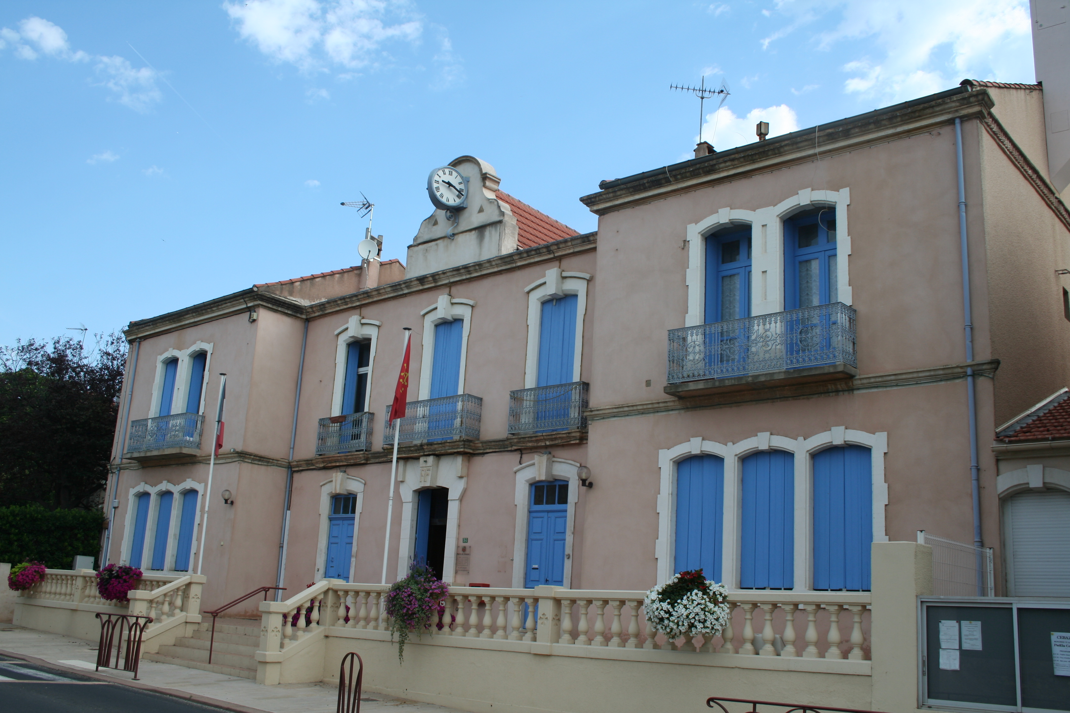 Cébazan (Hérault) - mairie